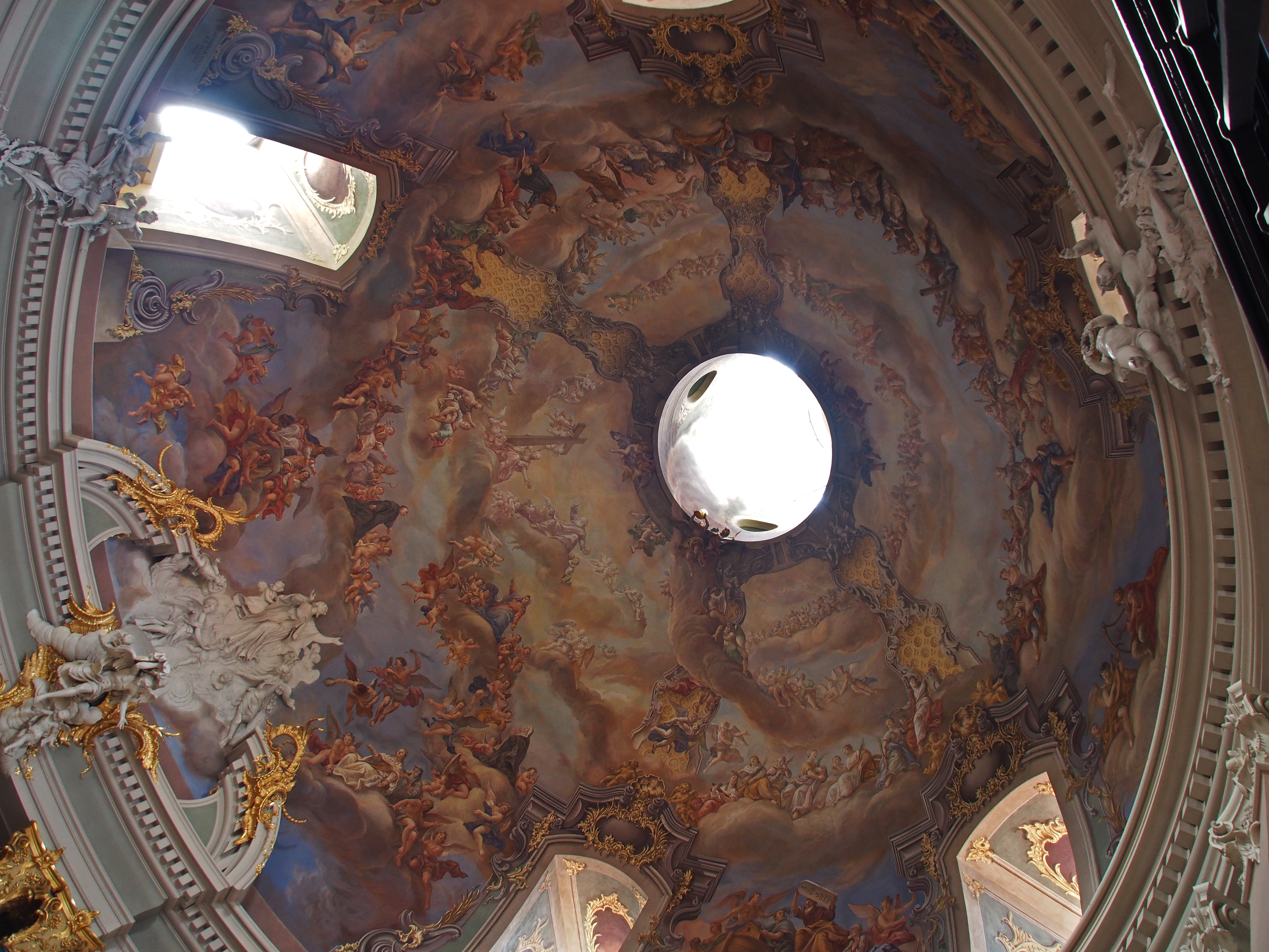 Kuppelfresko in der St. Clemenskirche Münster (Westfalen)